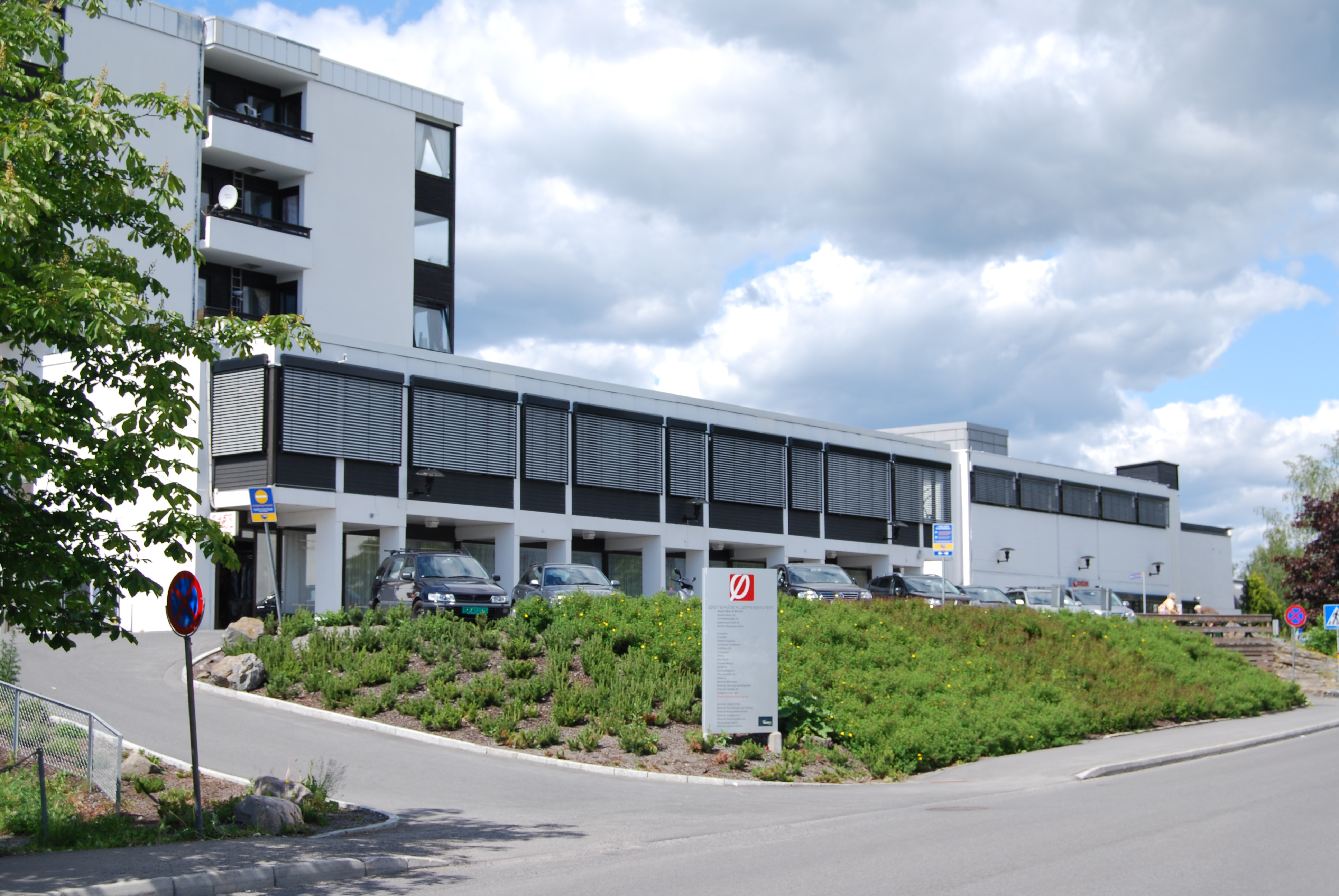 Østerås (Oslo) 2009 r.